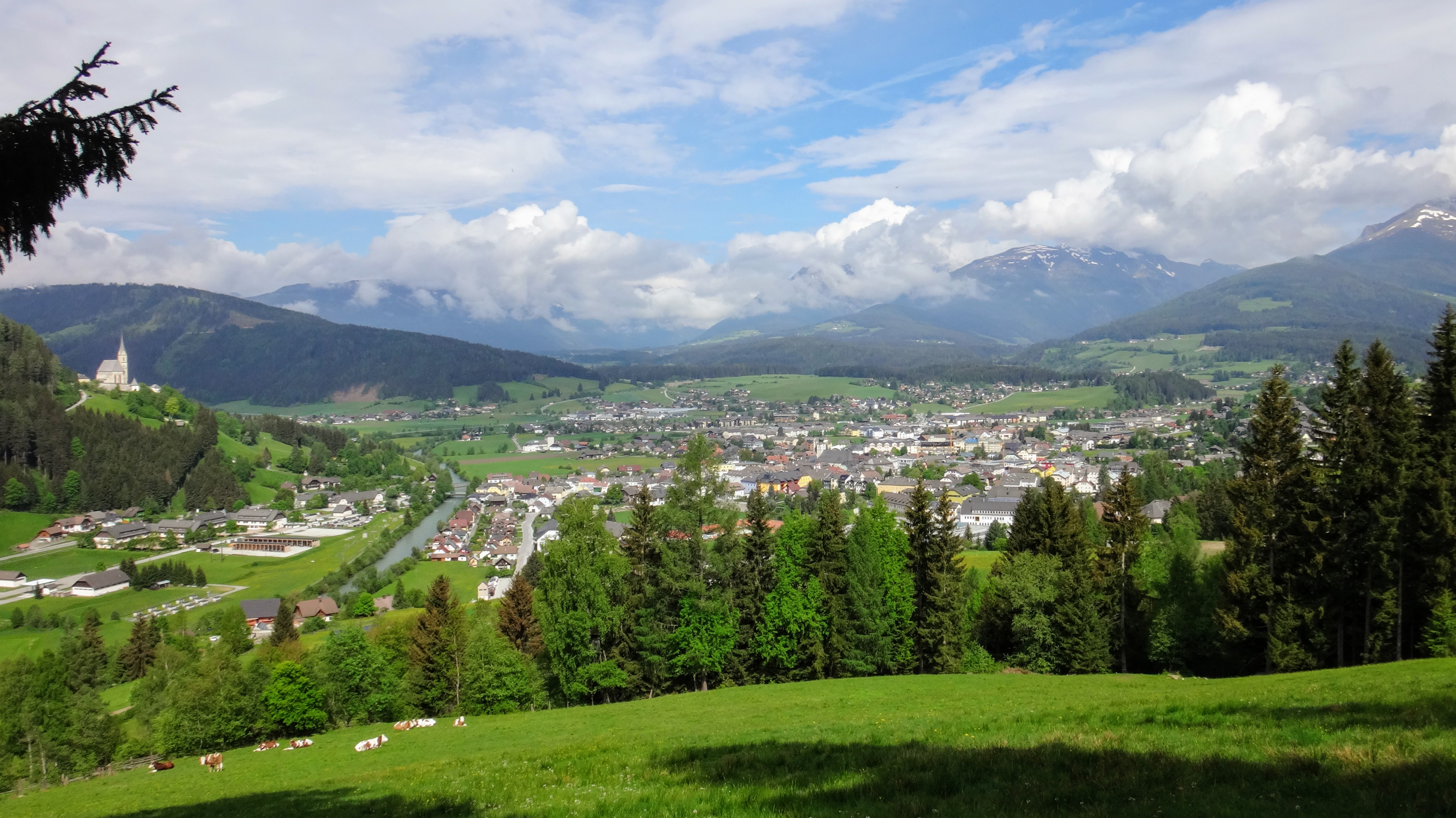 Blick von Osten auf den Markt Tamsweg, Salzburg